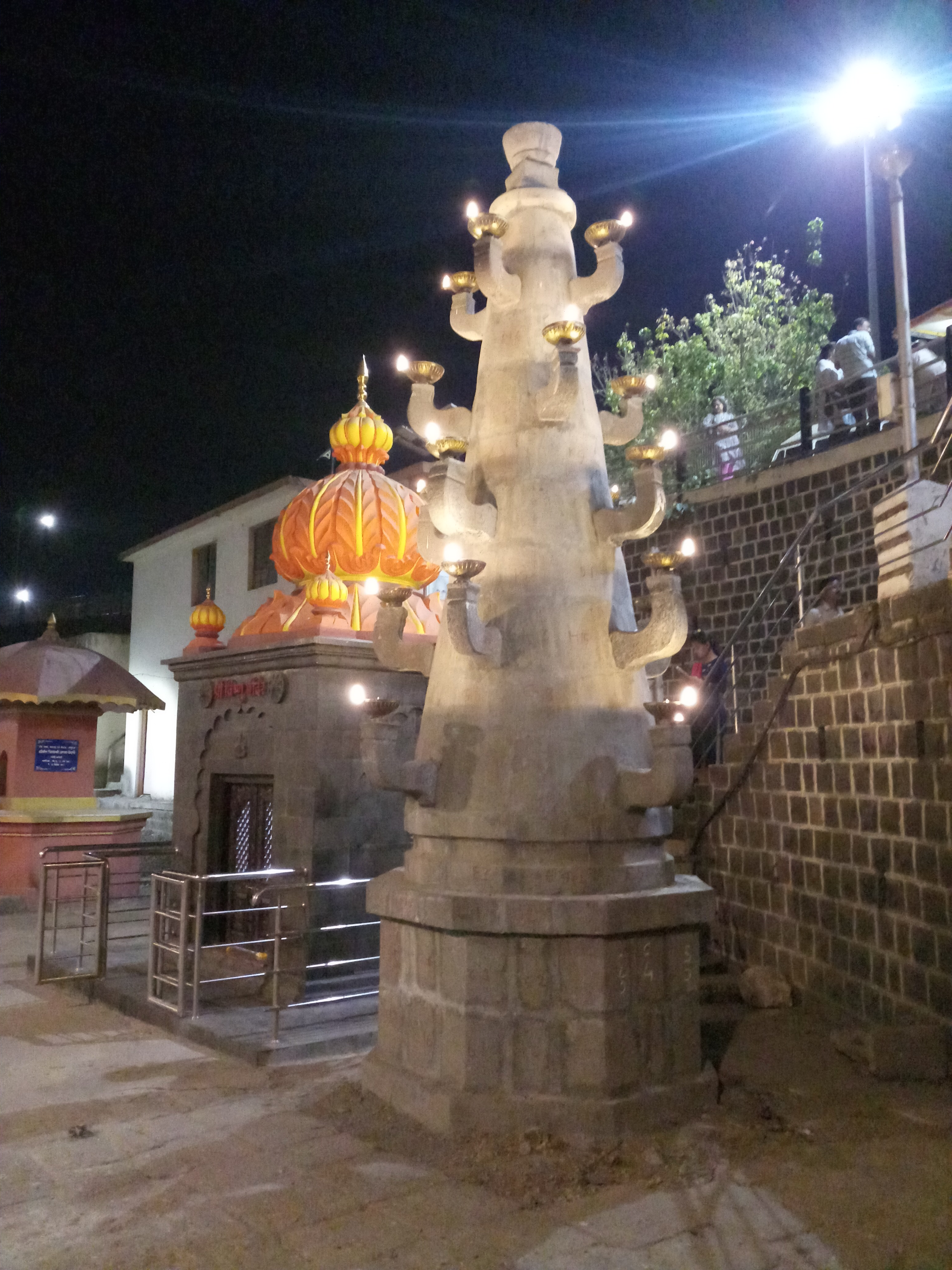 Deepmala Deep Stamb in Omkareshwar Temple in Pune